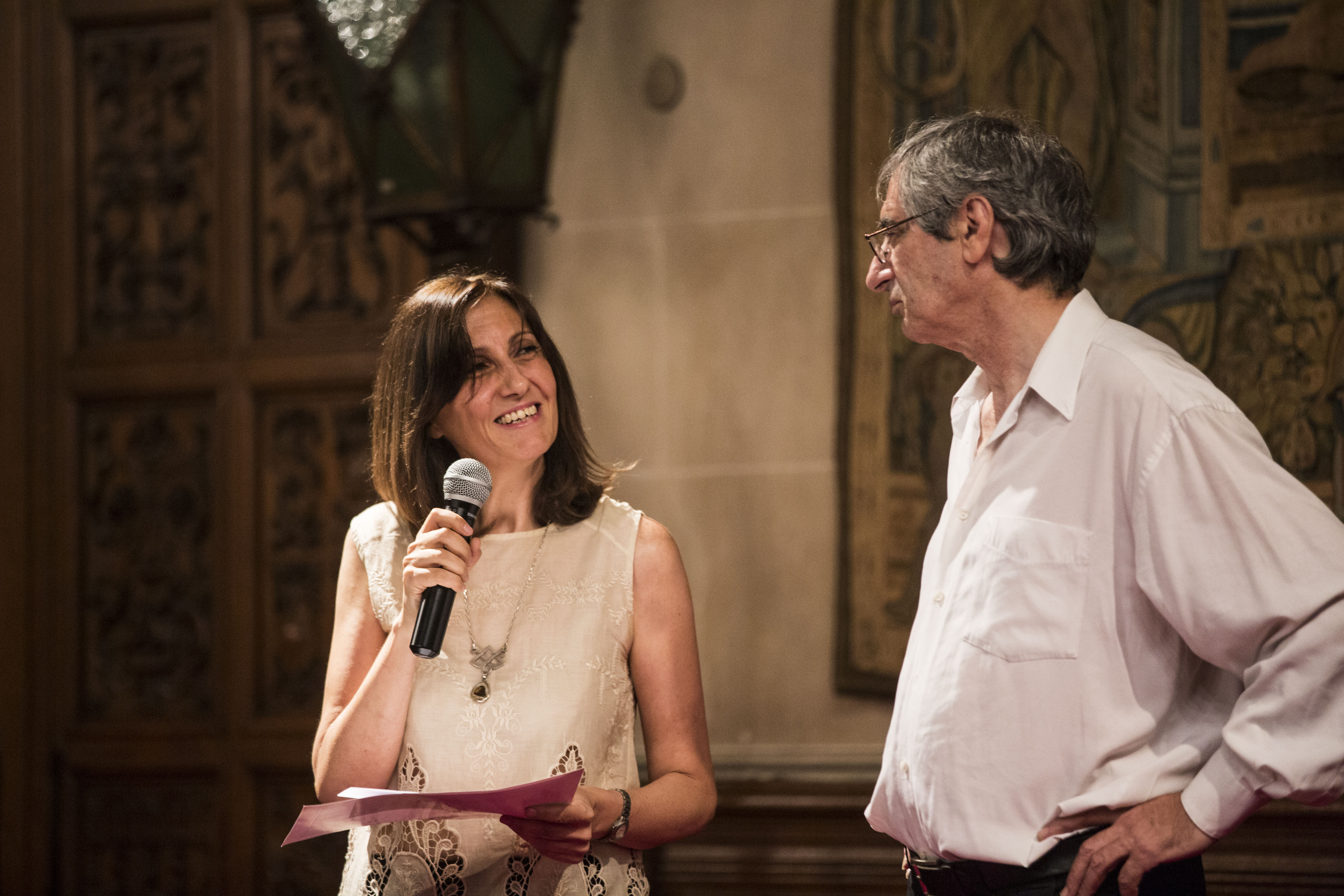 La pianista Lilián Saba y el guitarrista Claudio Espector reciben el premio Fondo Nacional de las Artes 2015.